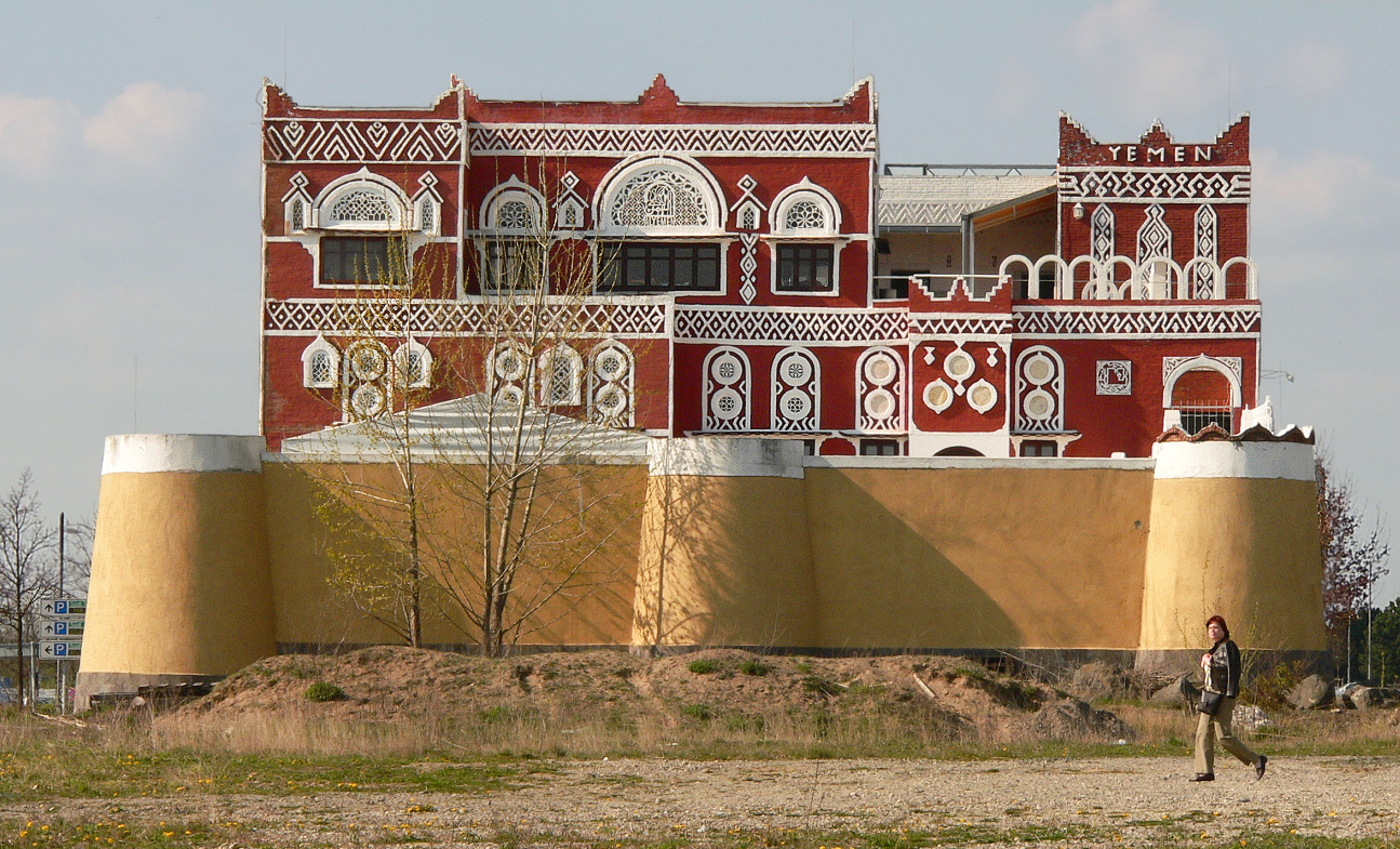 Ehemaliger Pavillon des Jemen auf dem EXPO Gelände Hannover